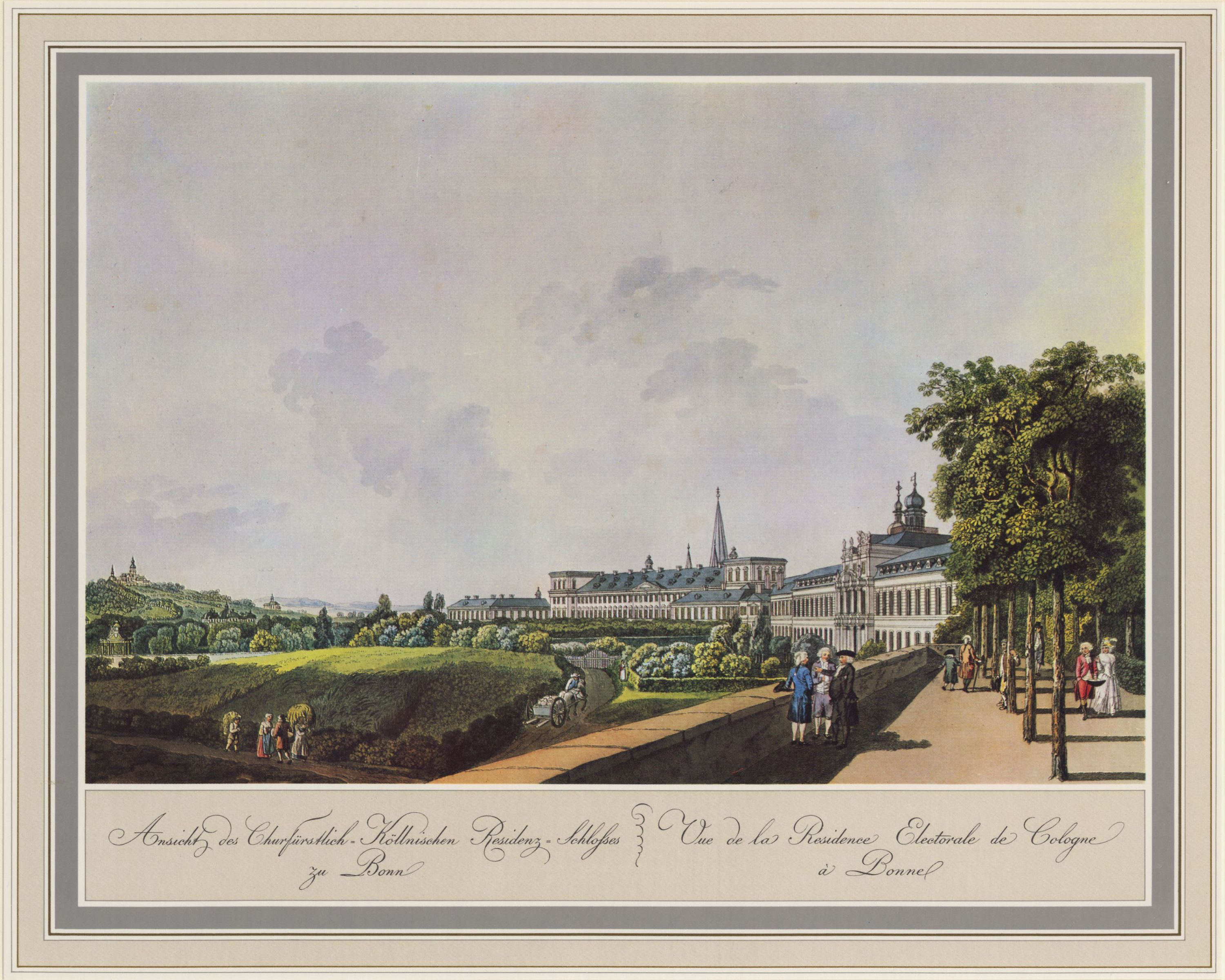 Bonn, Residenzschloss vom Alten Zoll aus; Kupferstich, aquarelliert, aus: »Fünfzig malerische Ansichten Rhein-Stroms von Speyer bis Düsseldorf«, erschienen bei Artaria in Wien 1798; nach Aquarellen von Laurenz Janscha, die im Sommer 1792 entstanden